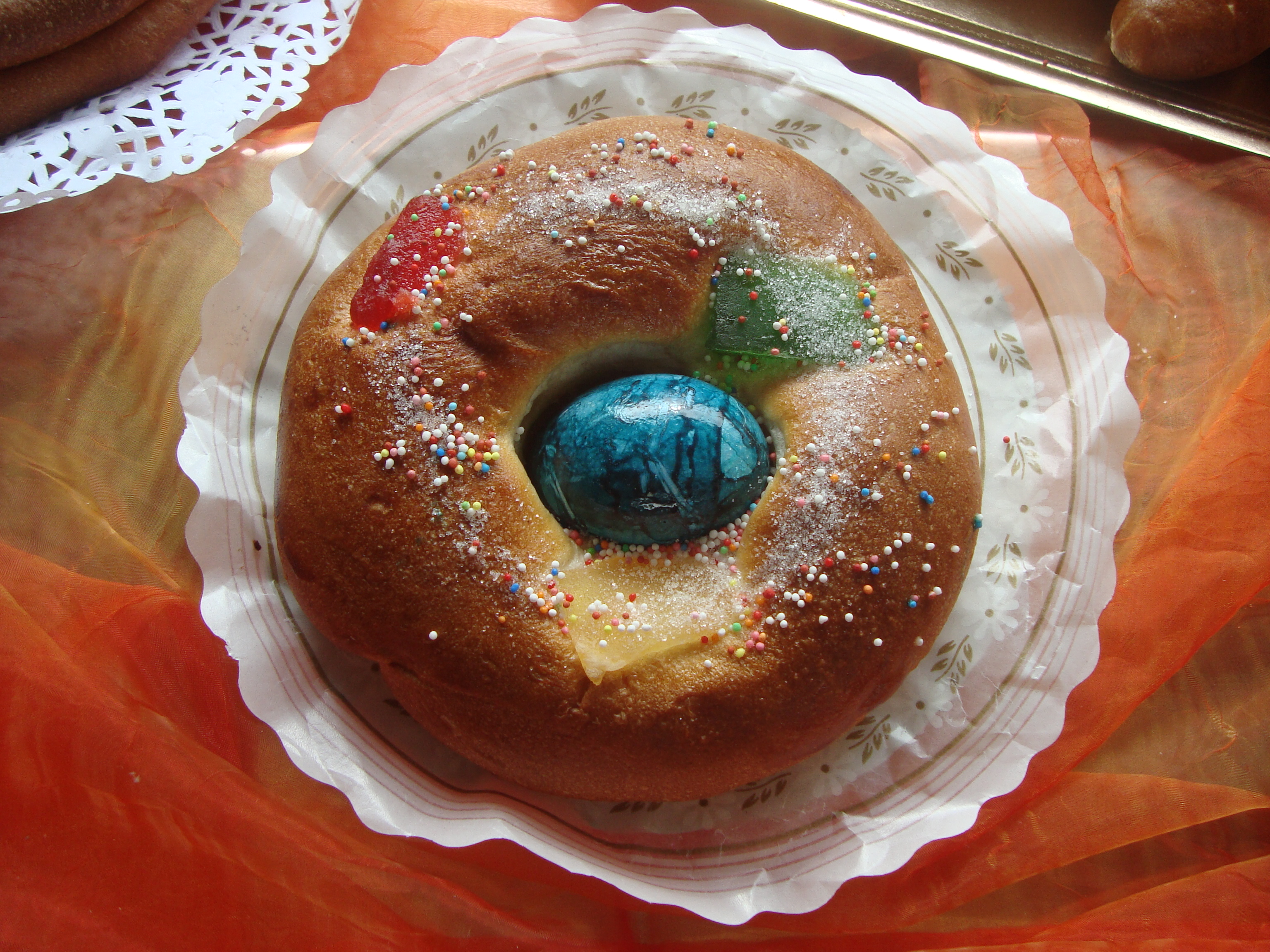 El Mico de Pascua es una mona de Pascua sin agujero y de un solo huevo, colocado este en el centro de la masa. Reposteria tradicional de Torreblanca (Castellón)